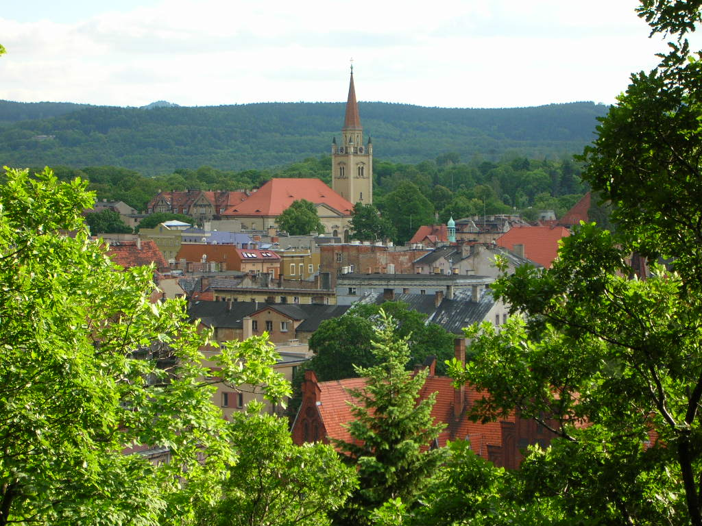 Wałbrzych - widok z Parku Miejskiego.